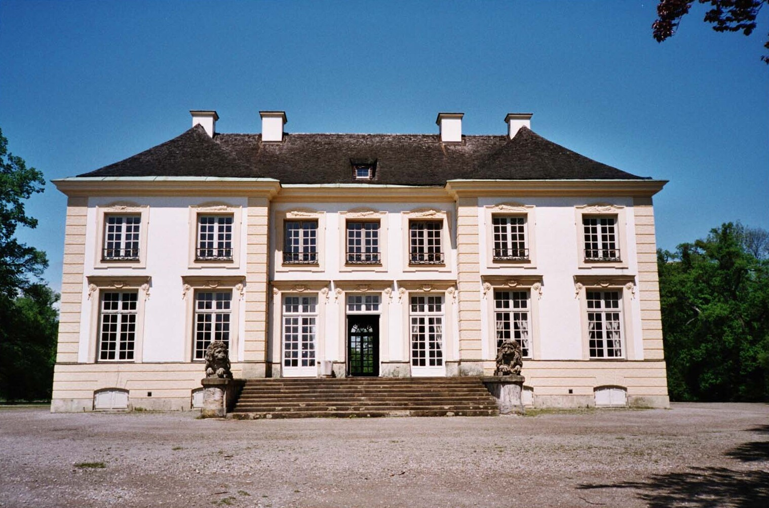 Badenburg, Schloss Nymphenburg, München. The Badenburg, Nymphenburg Palace, Munich, Bavaria.